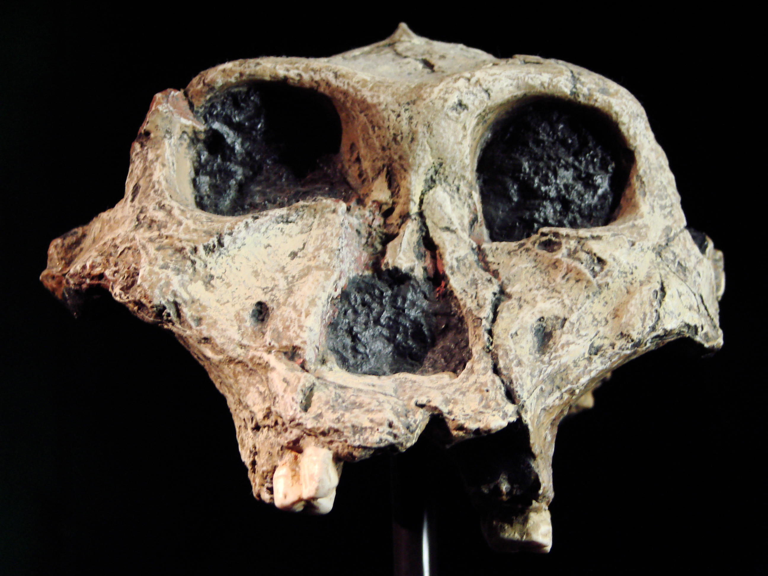 Muséum d'Anthropologie, campus universitaire d'Irchel, Université de Zurich (Suisse) : Moulage du crane de Paranthropus robustus, crâne SK-48 (Swartkrans,Afrique du sud)